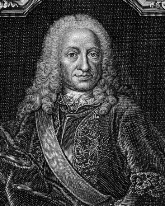 Königsfeld, Johann Georg Joseph von (1679-1750) Beamter; Diplomat